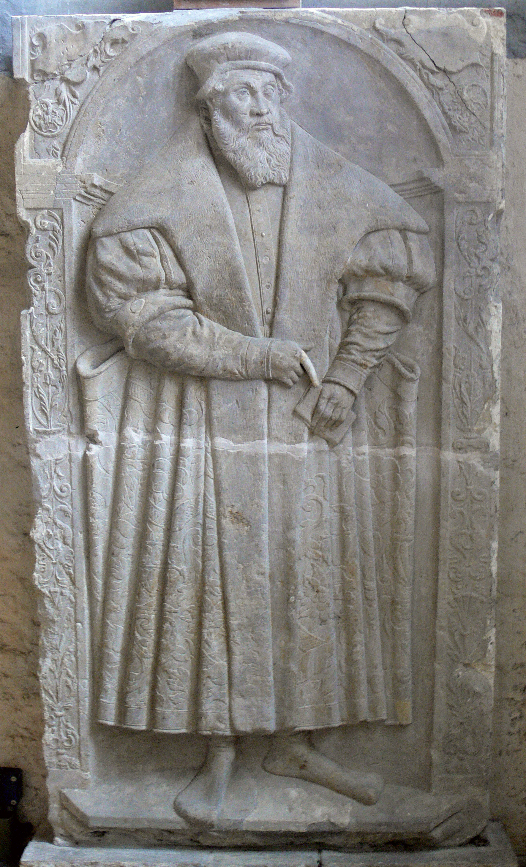 Jena, Stadtkirche St. Michael Epitaph des kursächsischen Kanzlers Gregor Brück